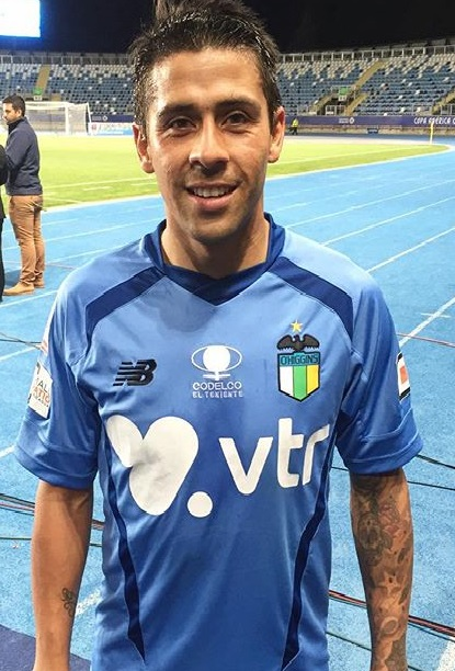 Ramón Fernández en la cancha del Estadio El Teniente después de un partido contra Huachipato.